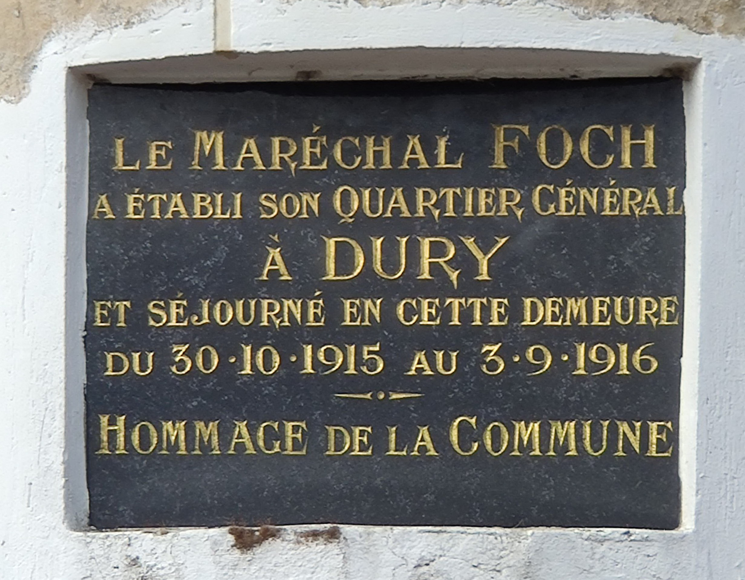 Dury - Château : Plaque commémorative Ferdinand Foch